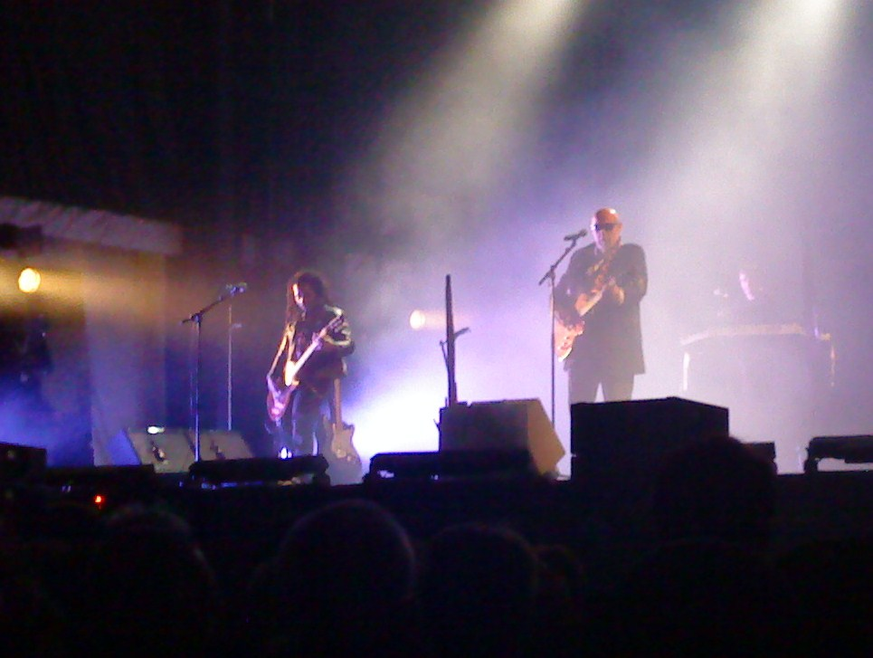 Charlélie Couture lors de sa représentation au Parc de la Pépinière dans le cadre des nuits de Stan.